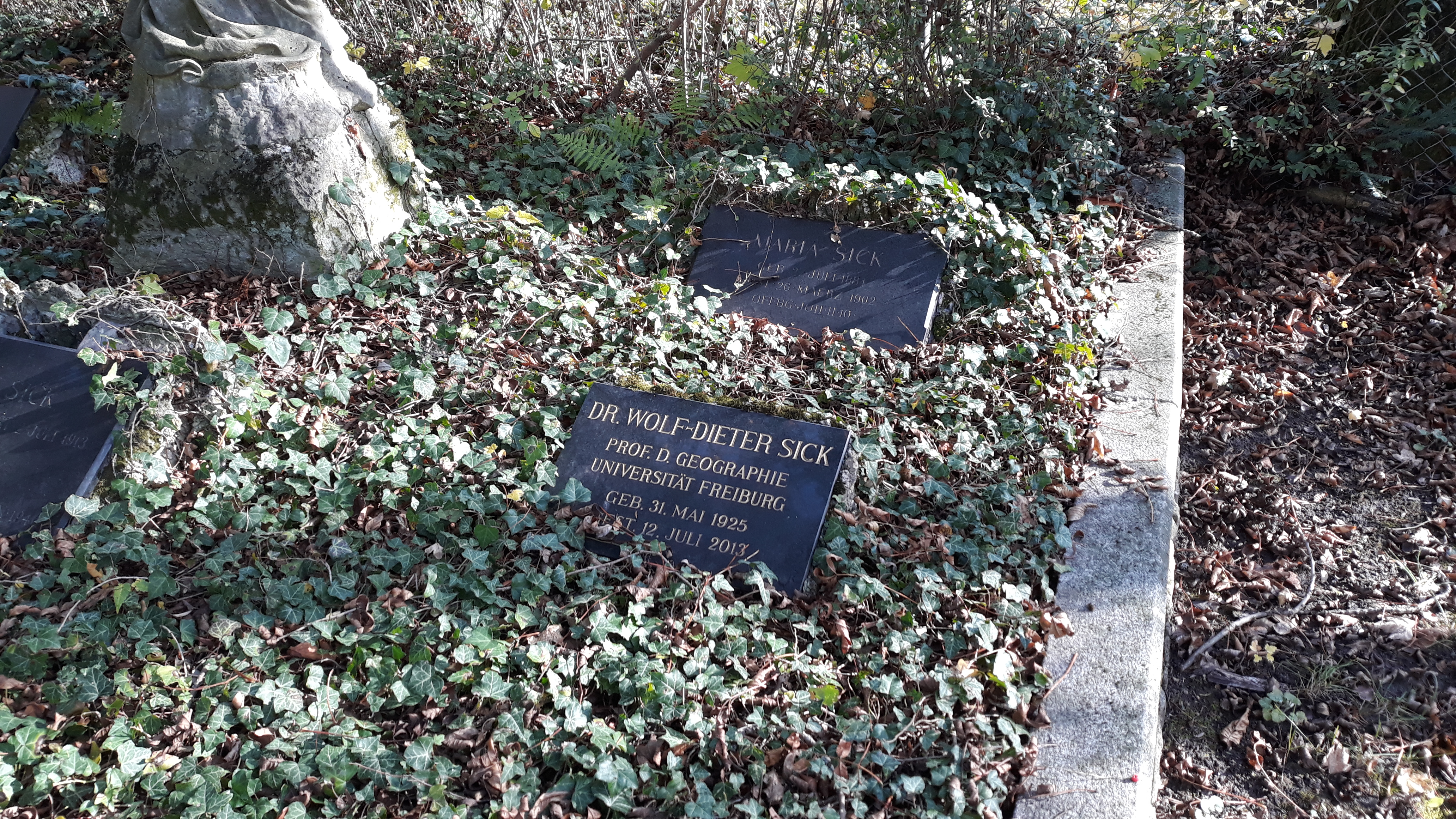 Das Grab des deutschen Geographen Wolf-Dieter Sick auf dem Pragfriedhof Stuttgart.